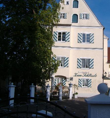 Unterfinningen